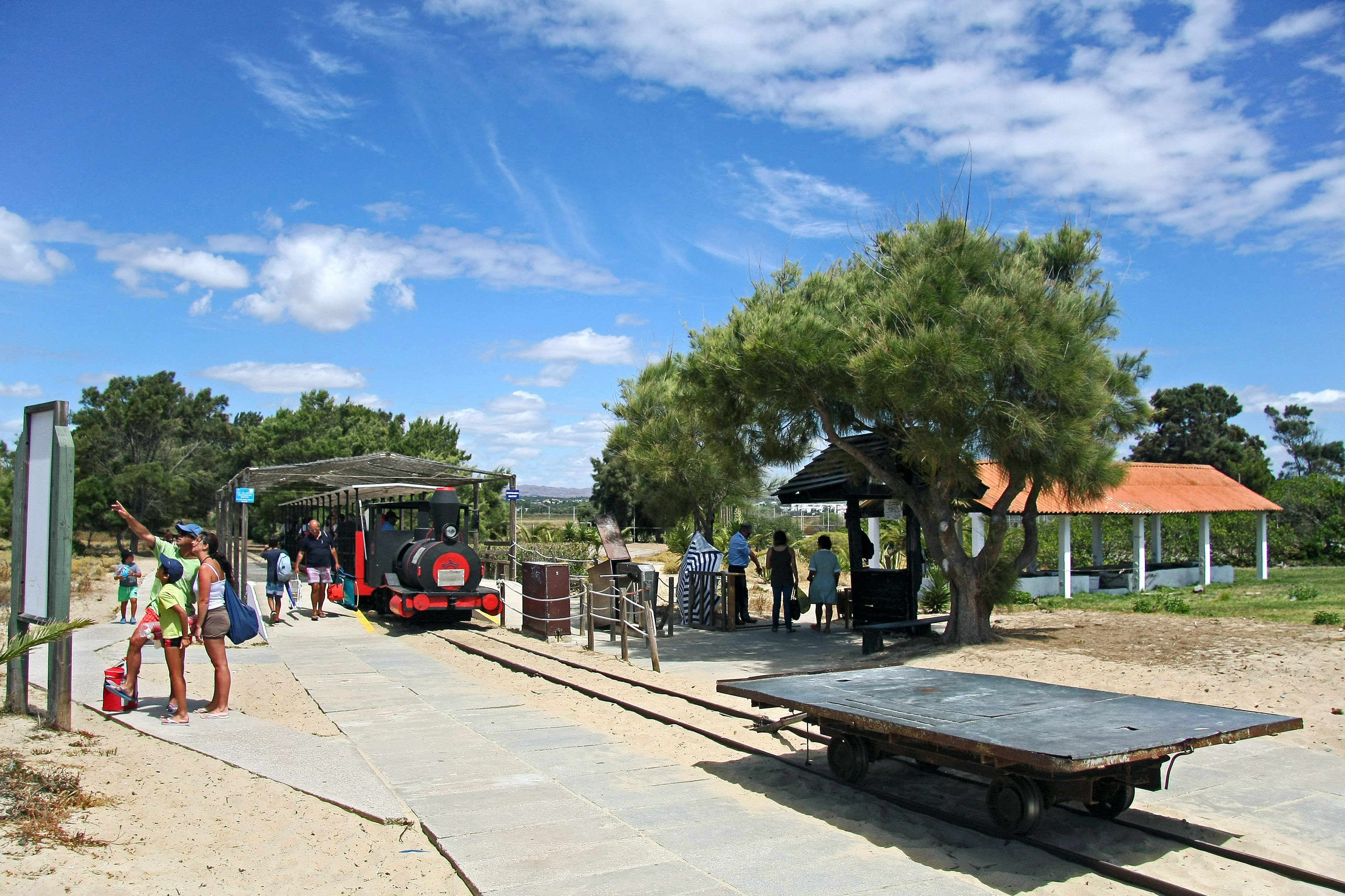 Acesso à Praia do Barril - Portugal 🇵🇹